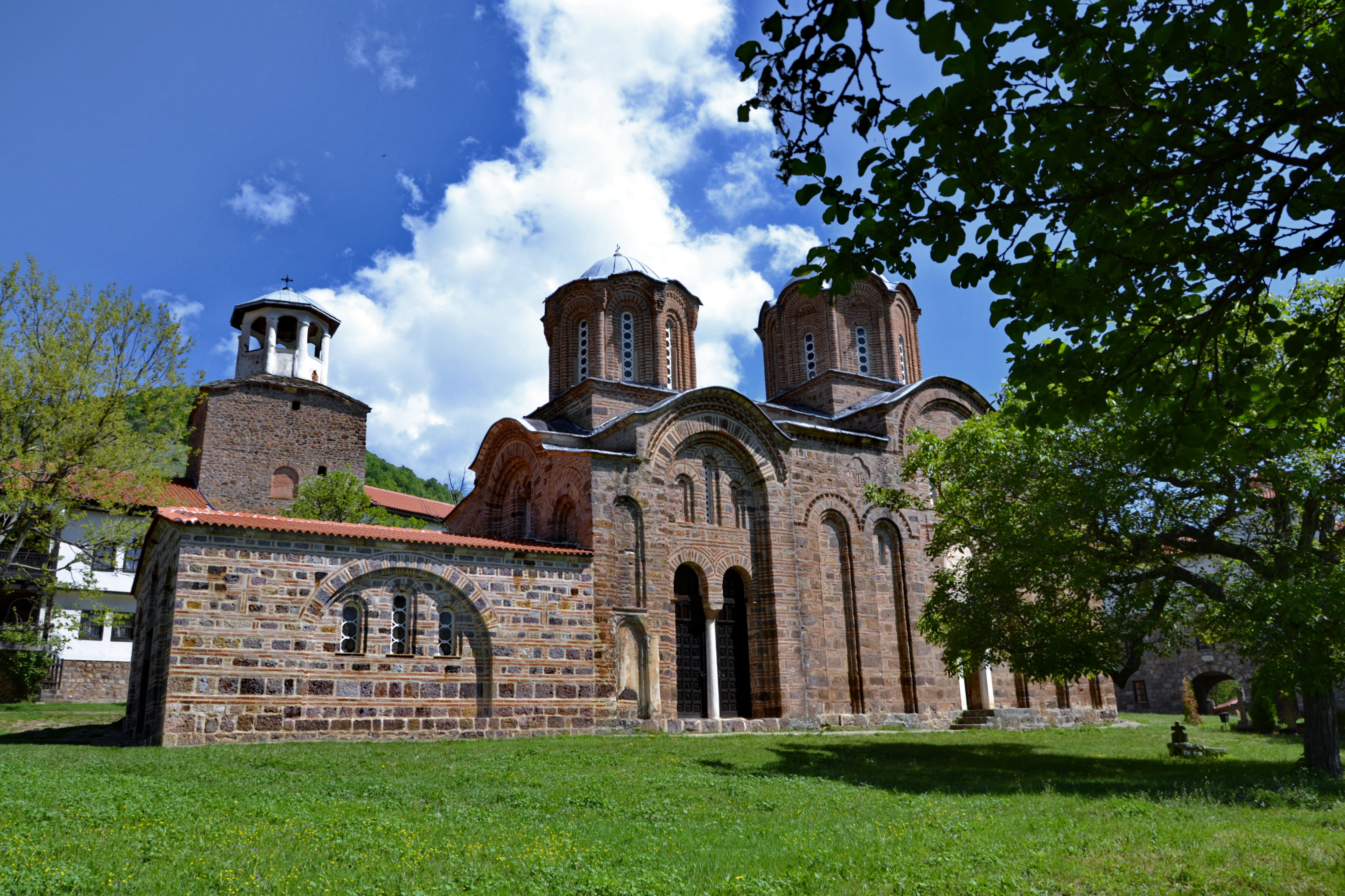 Фотографија од јужната страна на Манастирот Св.Архангел Михаил во с.Лесново,наречен Гаврил Лесновски.